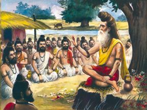 संस्कृतम्: गुरुकुल शिक्षण